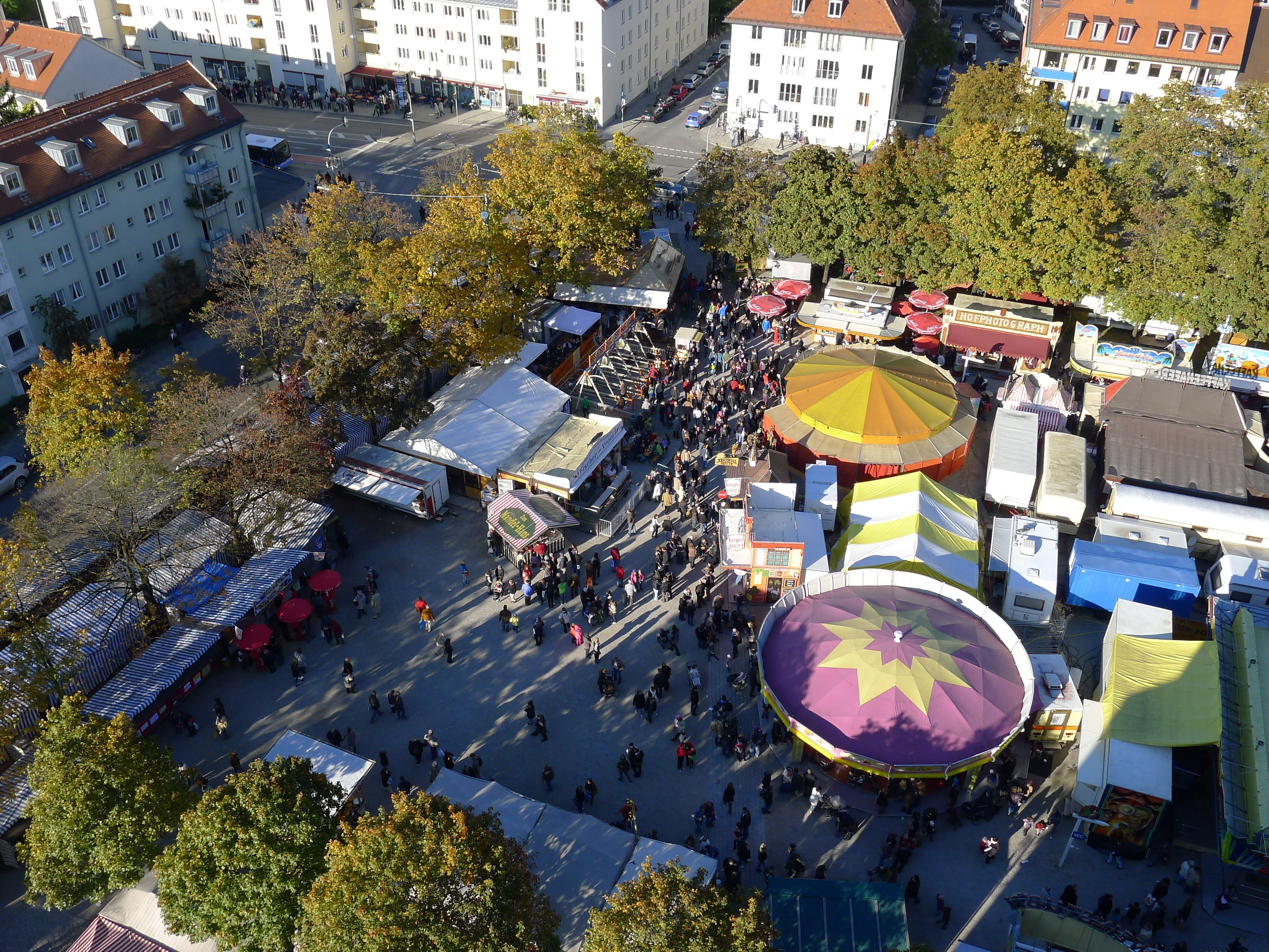 Auer Dult, München: Blick vom Turm der Mariahilfkirche auf den Vergnügungsbereich